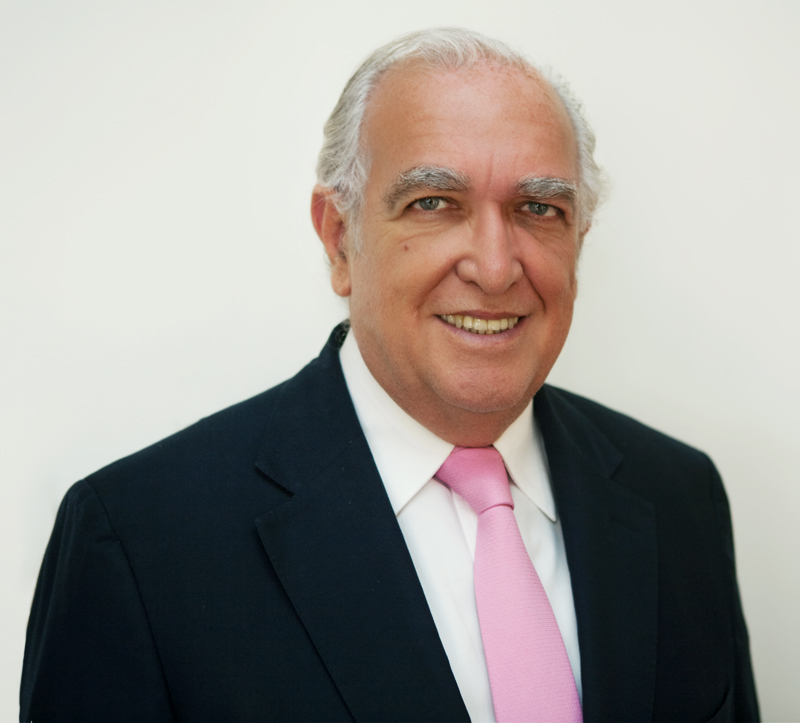 Ricardo Gil Lavedra